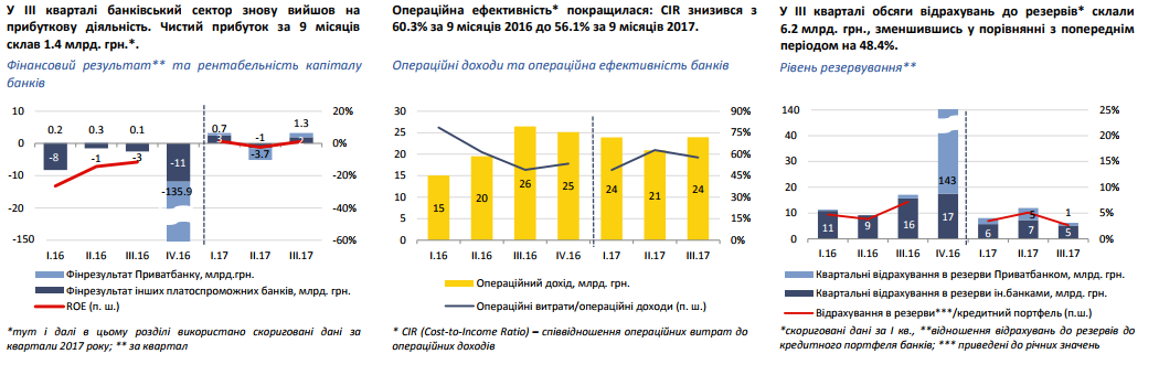 Фінансові результати банківського сектору за 9 місяців 2017 року